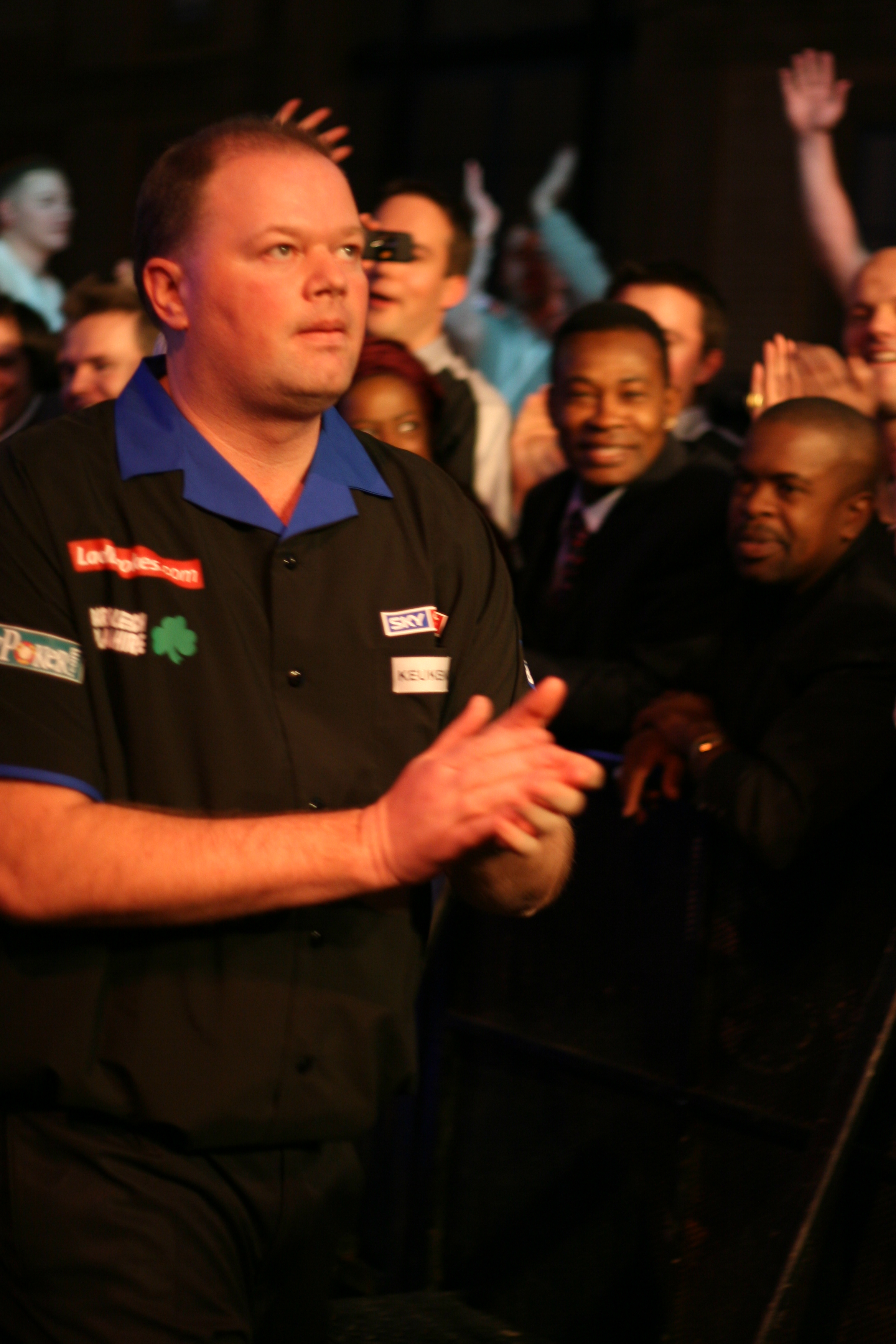 Raymond van Barneveld